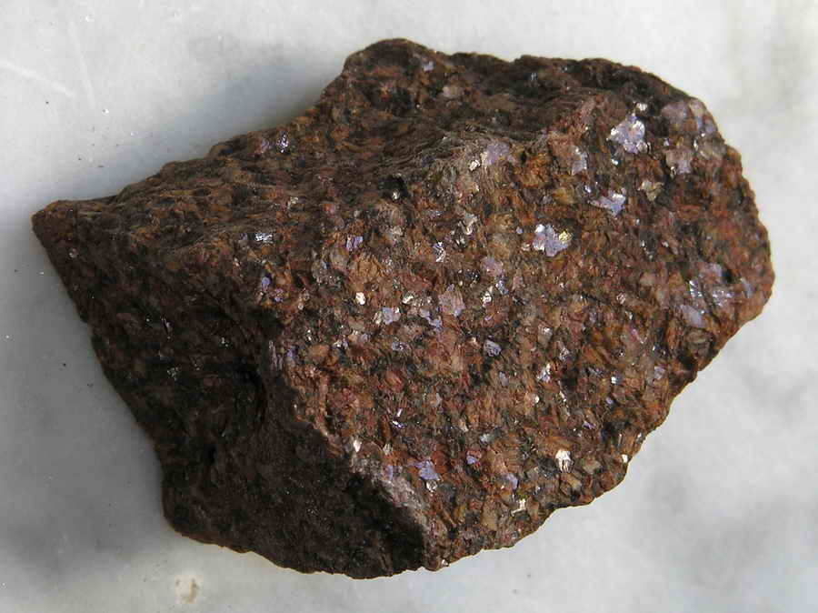 mineral. Nikon E-8800